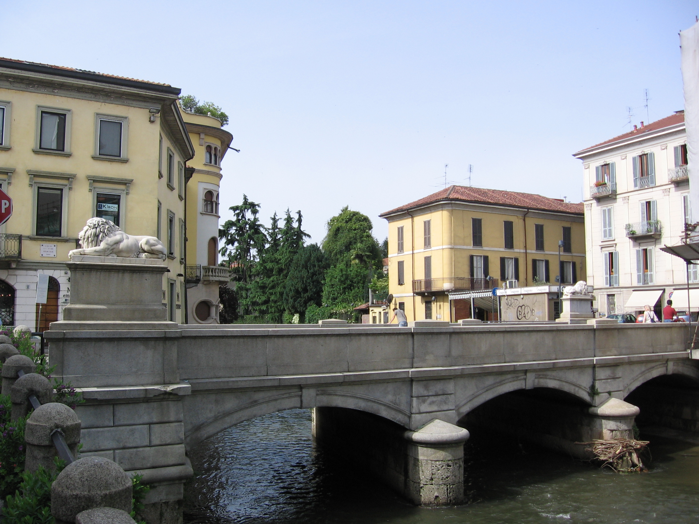 Ponte dei Leoni (Lions' bridge) in Monza